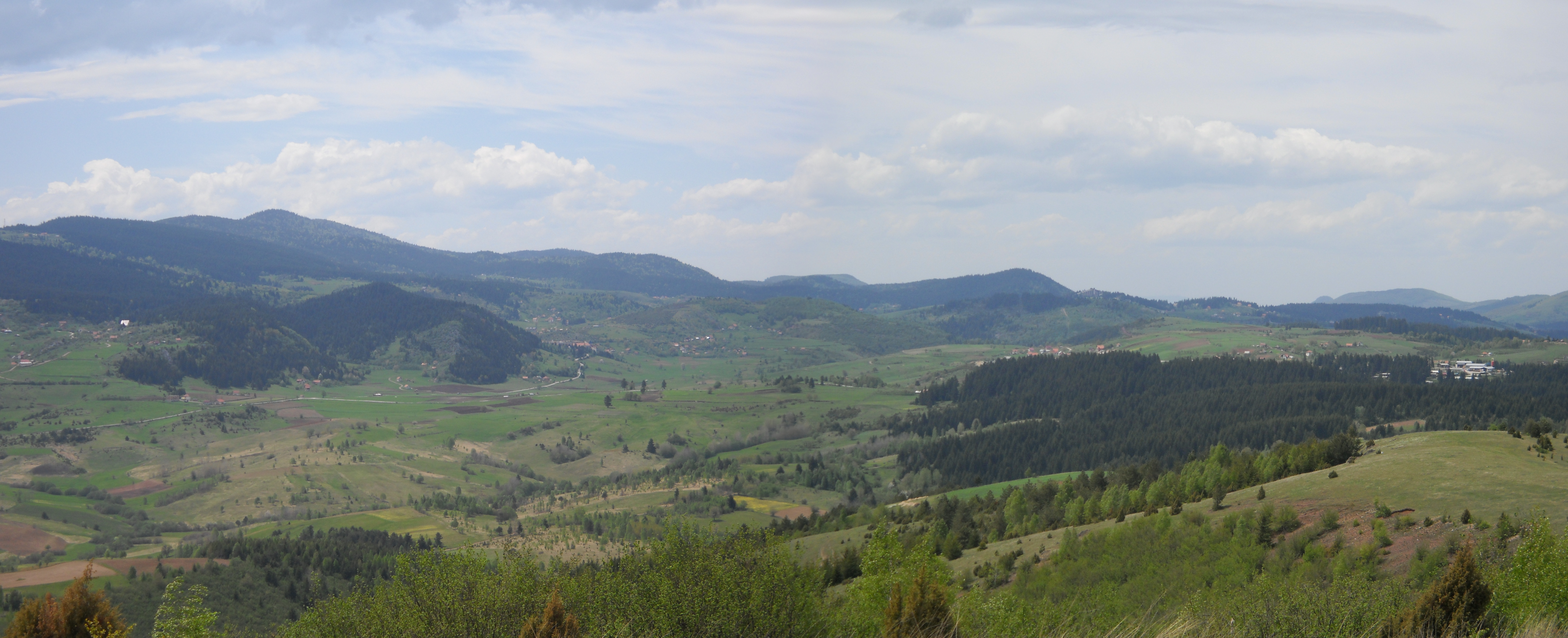 Zlatar